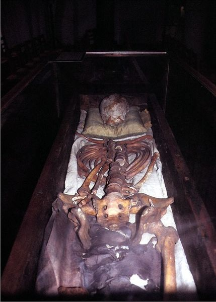 Sankt Knuds Kirke i Danmark. Kund den Helliges helgenskrin